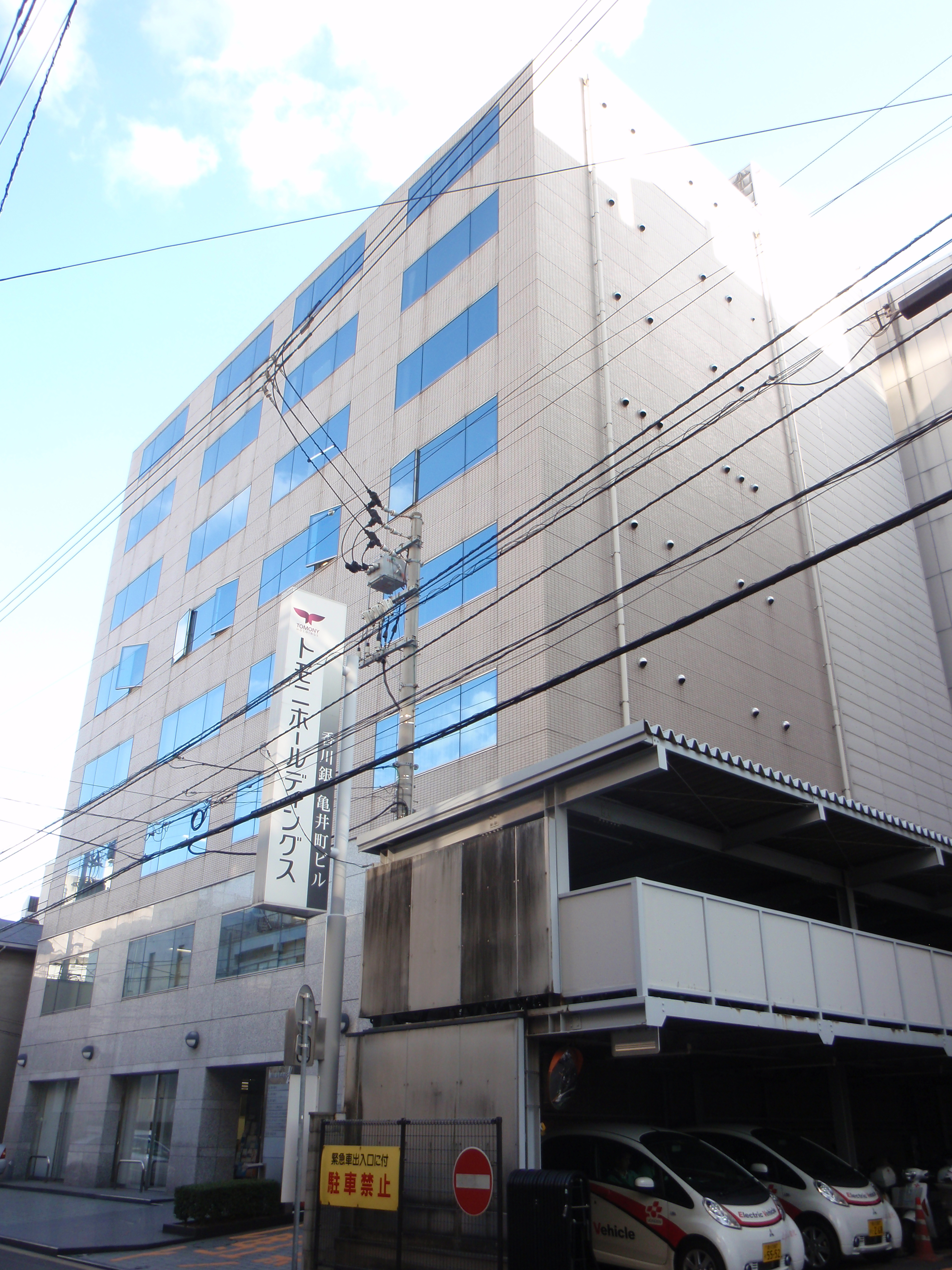 香川県高松市亀井町にあるトモニホールディングス株式会社の本社ビル。